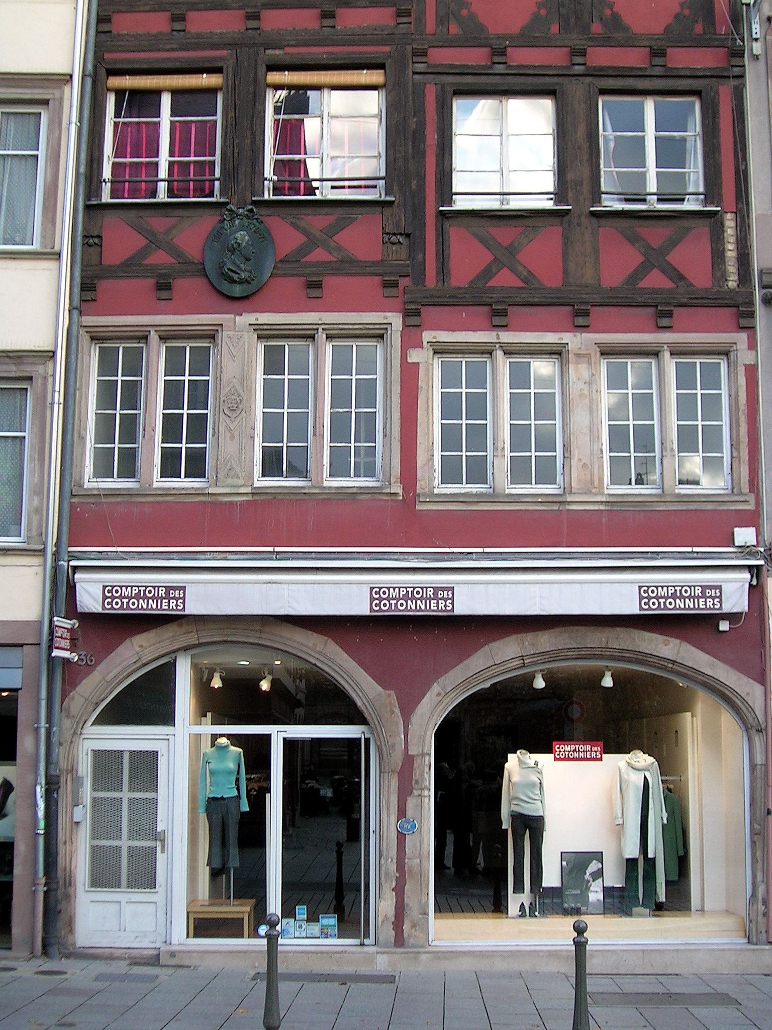 Strasburg, Goethehaus